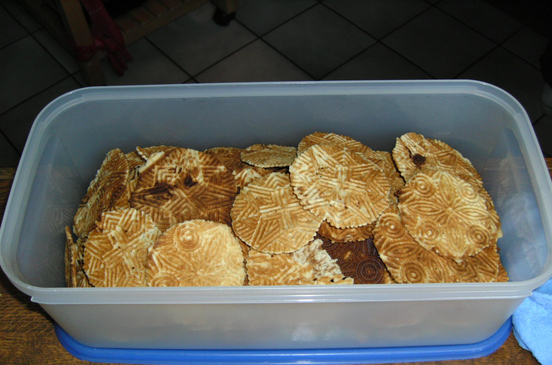 Bricelets sortant du fer à bricelets.